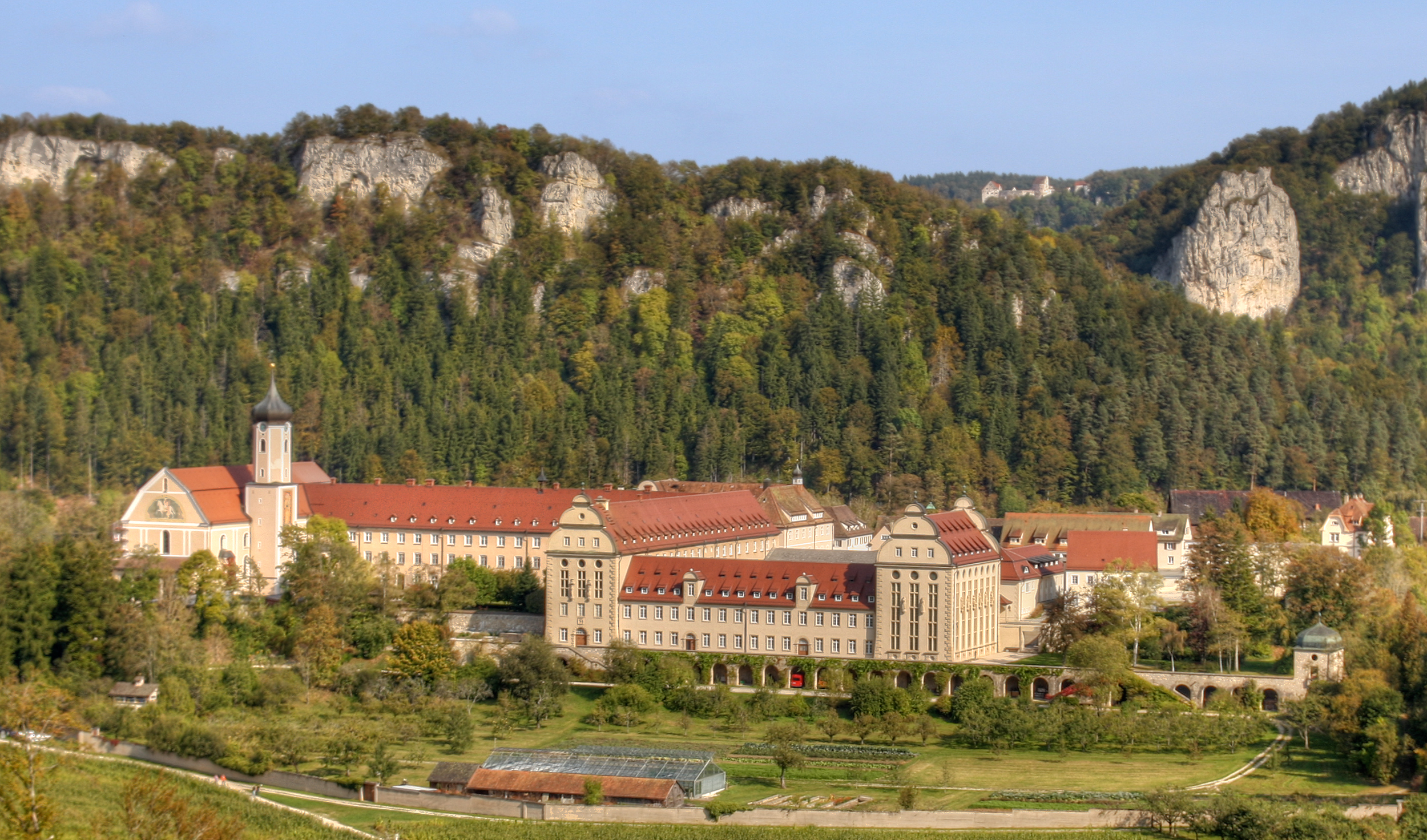 Blick auf Kloster Beuron, im Hintergrund die Burg Wildenstein.